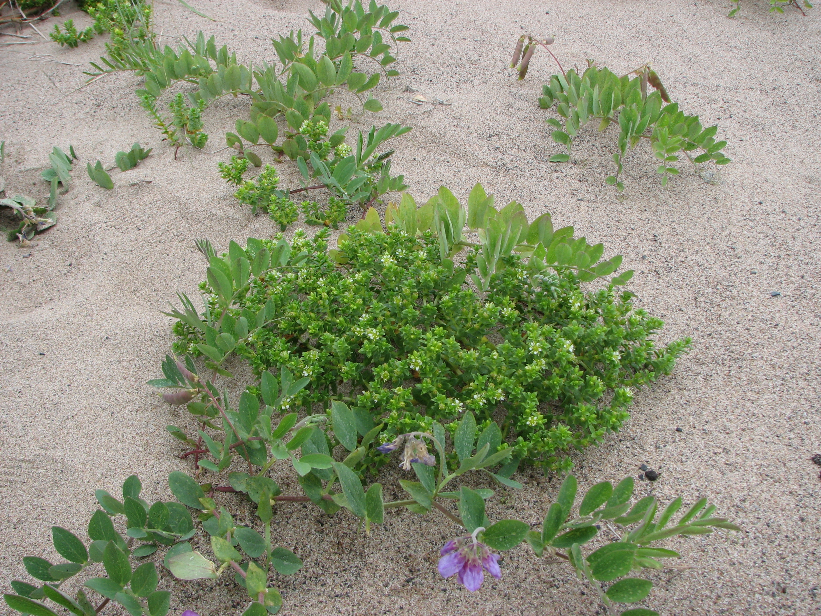 Flora on Sandskär island